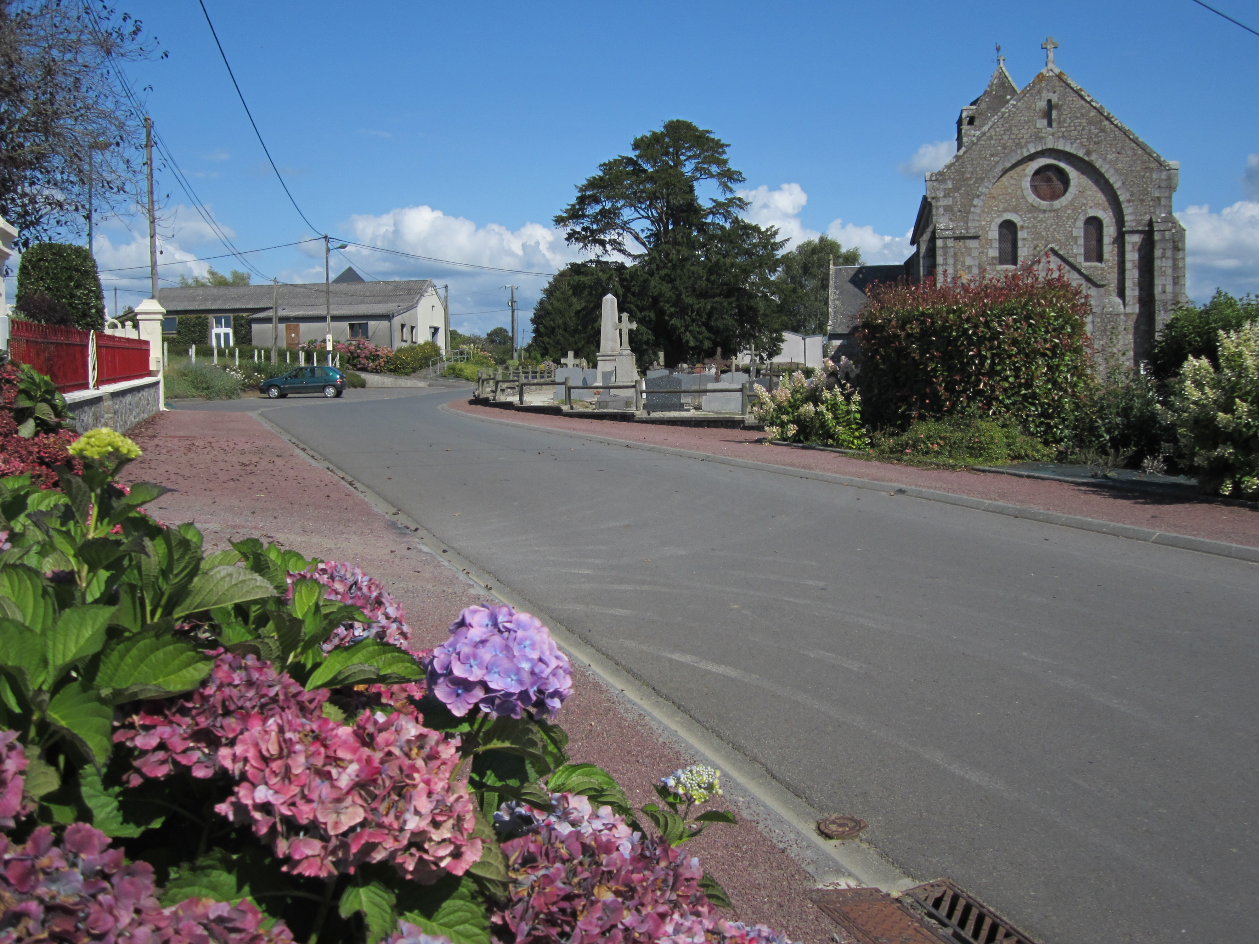 Subligny, Manche